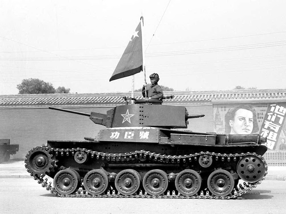 “功臣号”坦克，是日本造的97式改进型坦克。1948年辽沈战役攻打锦州作战中记功，命名为“功臣号”。1949年曾参加中华人民共和国开国大典阅兵式。